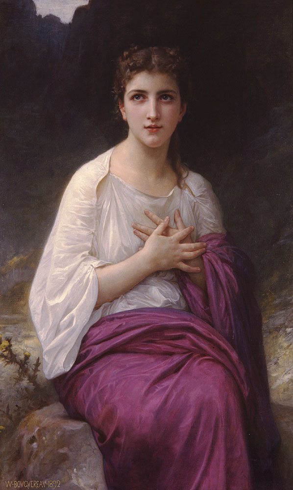 Psyche